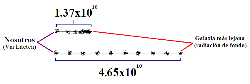 Tamaño del universo observable. Corrección sobre antiguo archivo